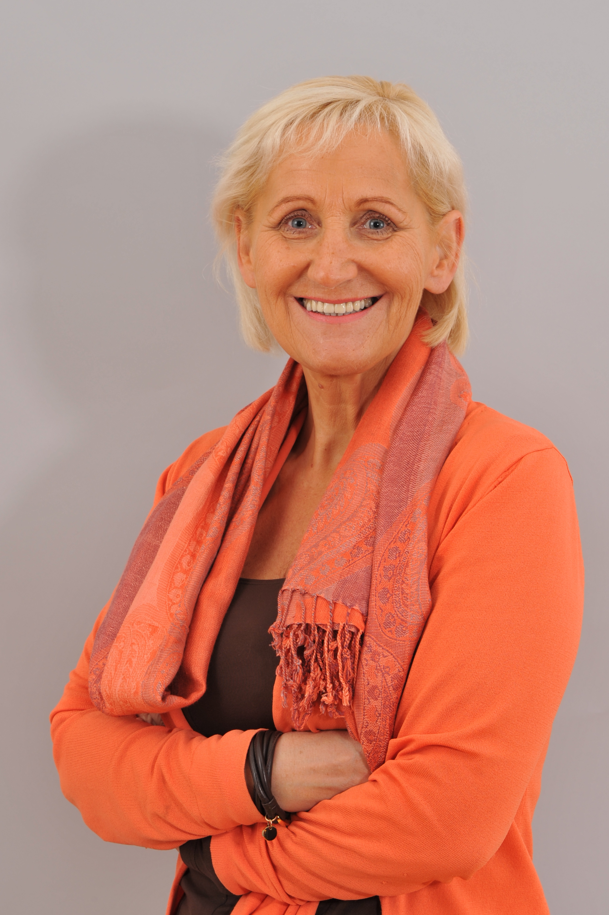 Landtagsprojekt Salzburg:, Sonja Ottenbacher